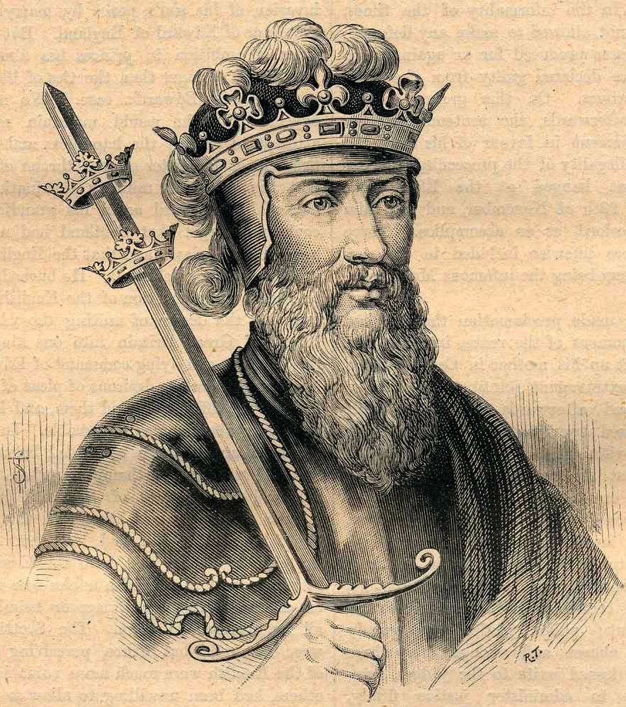 Sujet:Edward III. vun England op engem Stéch aus dem Cassell's History of England - Century Edition Source:Cassell's History of England - Century Edition; ex-Commons; a Form bruecht vum